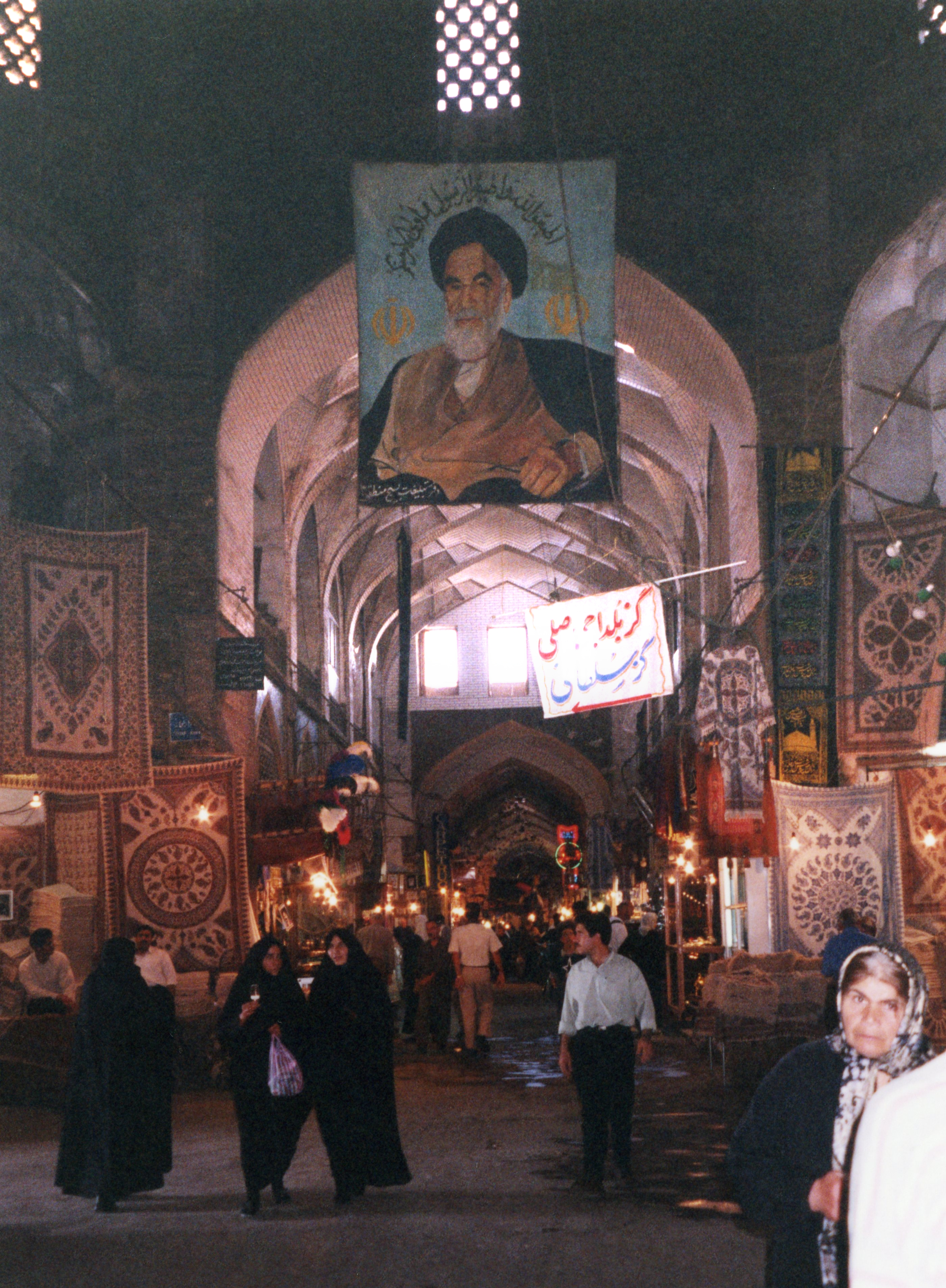 Iran - Ispahan - le bazar sous le portrait de l'Ayatollah - street Market place - Isfahan